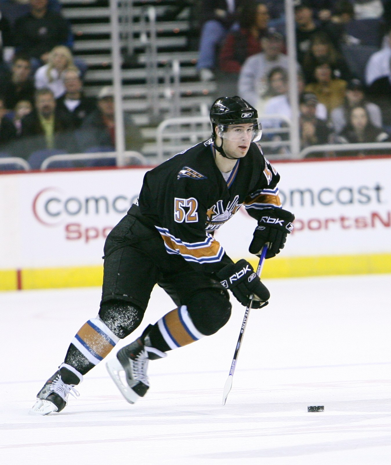 RO9A0892